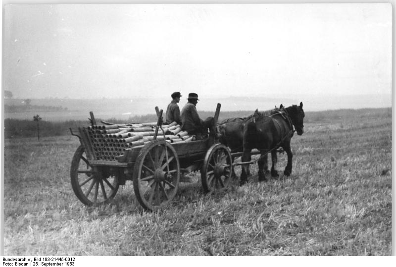 Eilsleben, transport von Drainagerohren Zentralbild Biscan 25.9.1953 1000 ha Kulturland werden gewonnen. Dank der großzügigen Hilfe unserer Regierung, die bisher 800.000 DM zur Verfügung gestellt hat, kann der sogenannte Seelsche Bruch in der Nähe von Eilsleben trockengelegt werden. Zu diesem Zweck werden 70 cm tiefe Gräben durch den ganzen Bruch gezogen und Drainröhren in einer Gesamtlänge von 610 km gelegt. Durch dieses Binnenentwässerung werden 1000 ha Moorwiesen, die mehr als 400 Bauern und Volksgütern der Umgebung gehören, in fruchtbaren Ackerboden verwandelt. UBz: Die Genossenschaftsbauern Leo Giering und Wolfgang Leskow von der LPG Eilsleben, deren Flächen hauptsächlich in diesem Jahr entwässert werden, haben den Transport der Drainröhren übernommen. Somit haben die Bauern und Genossenschaftsbauern, denen die Ländereien gehören, nur die Aufgabe, die Gräben wieder umzuschütten.